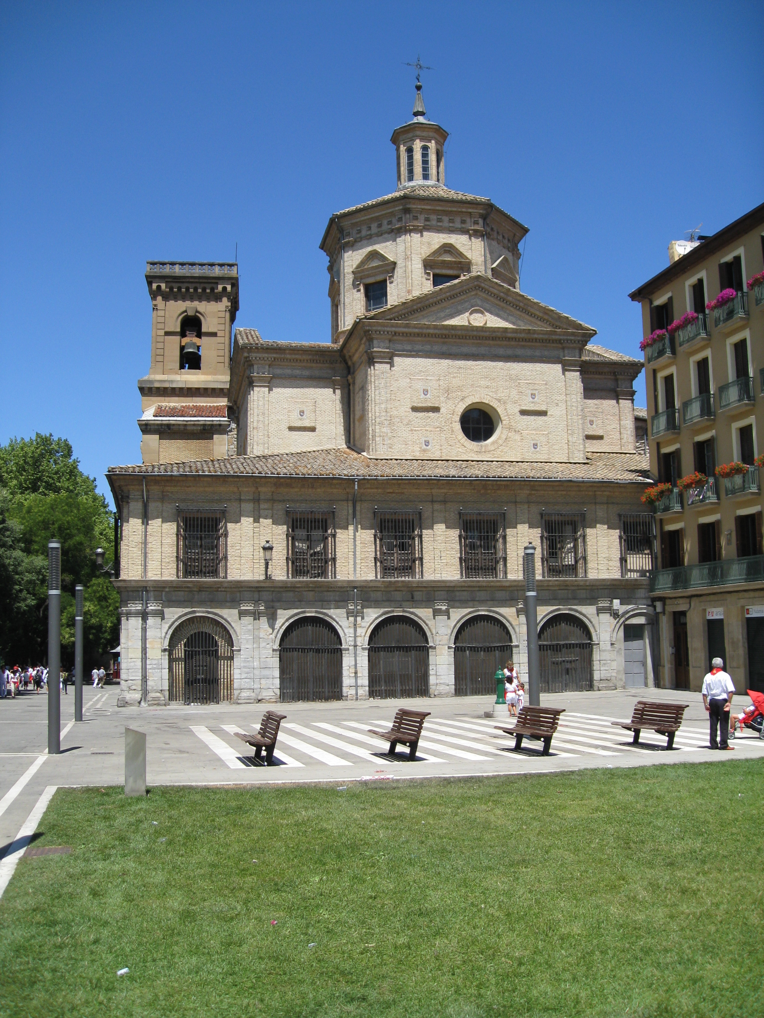 (img_5740.jpg)